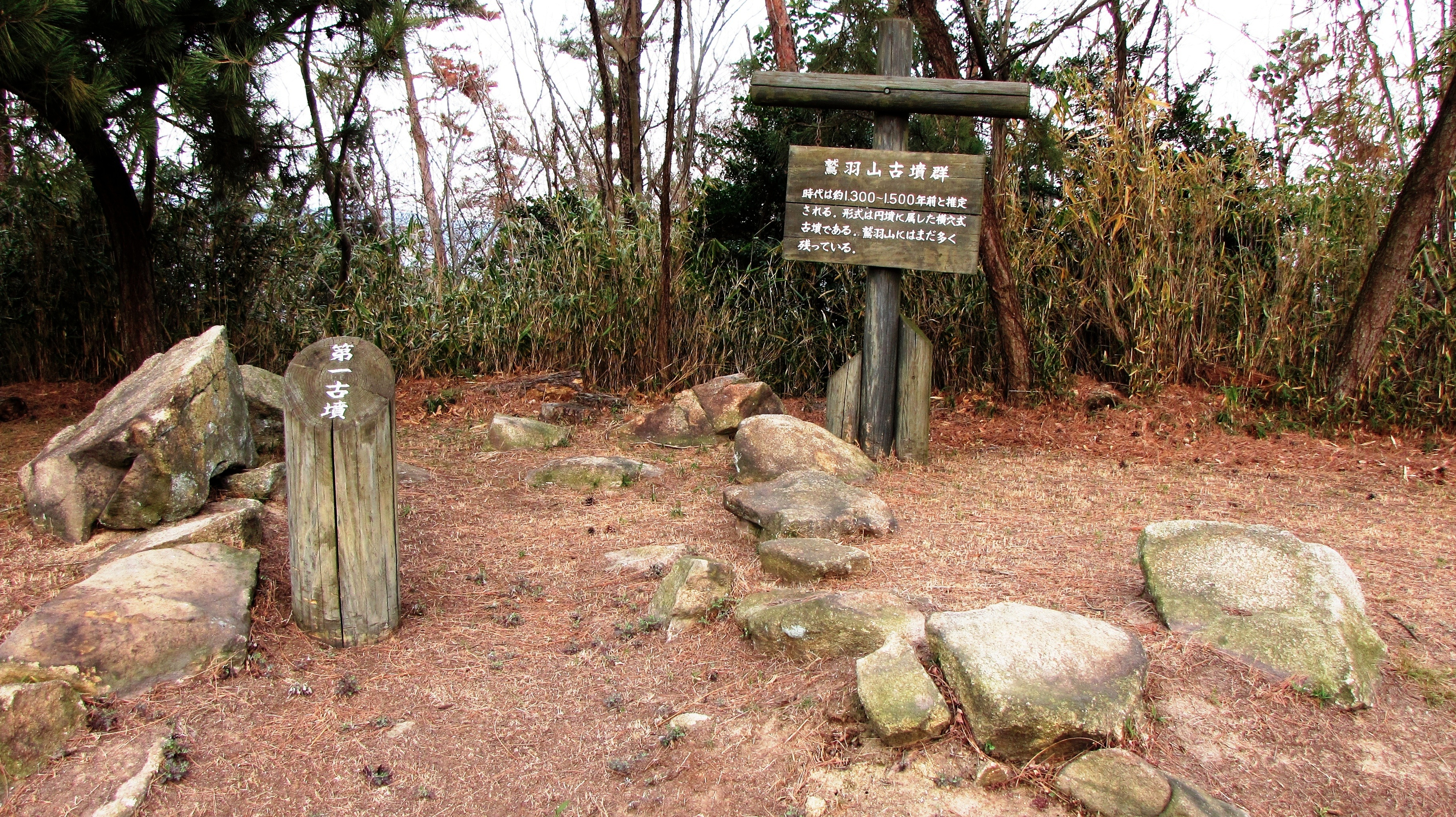 国立公園 鷲羽山 第一古墳